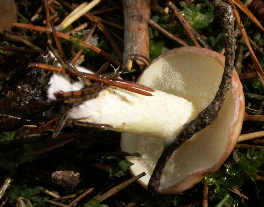 Suillus_granulatus, junger Pilz im Nadelmischwald